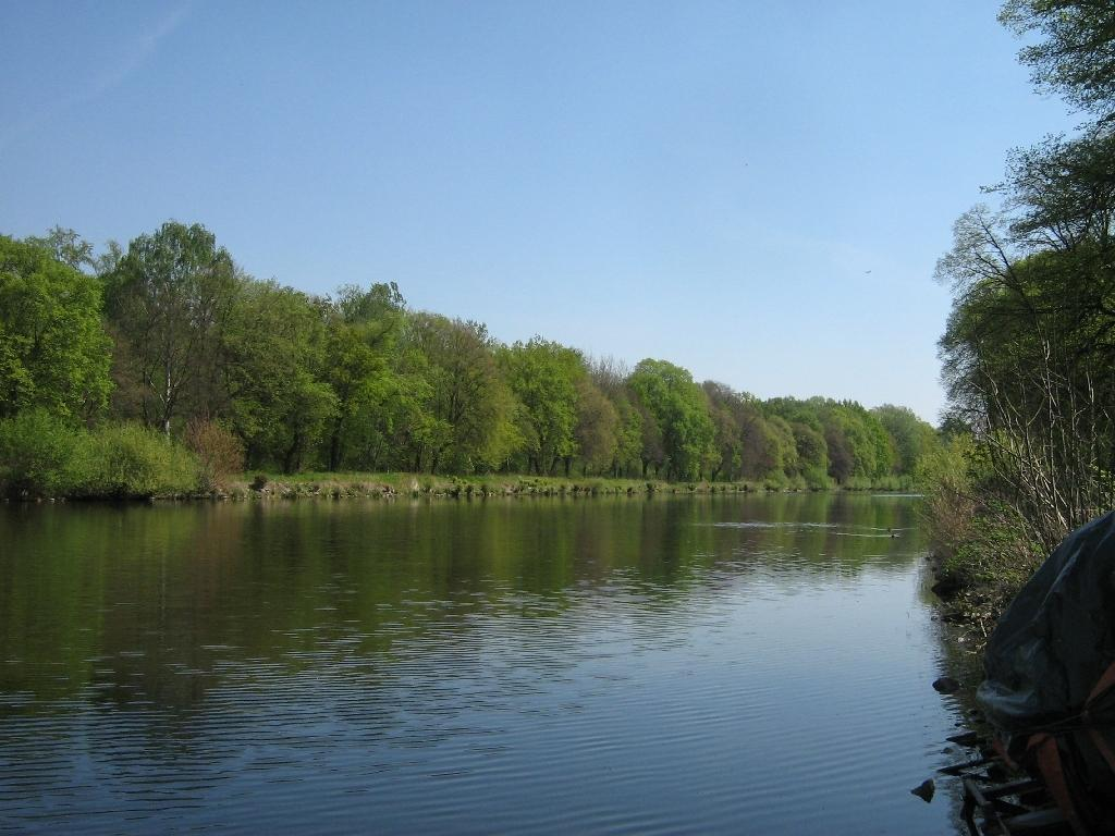 der Sacrow-Paretzer-Kanal bei Marquart/Potsdam-Schlänitzsee (Brandenburg, Germany)